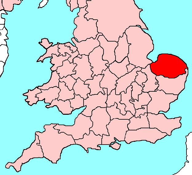 Norfolk